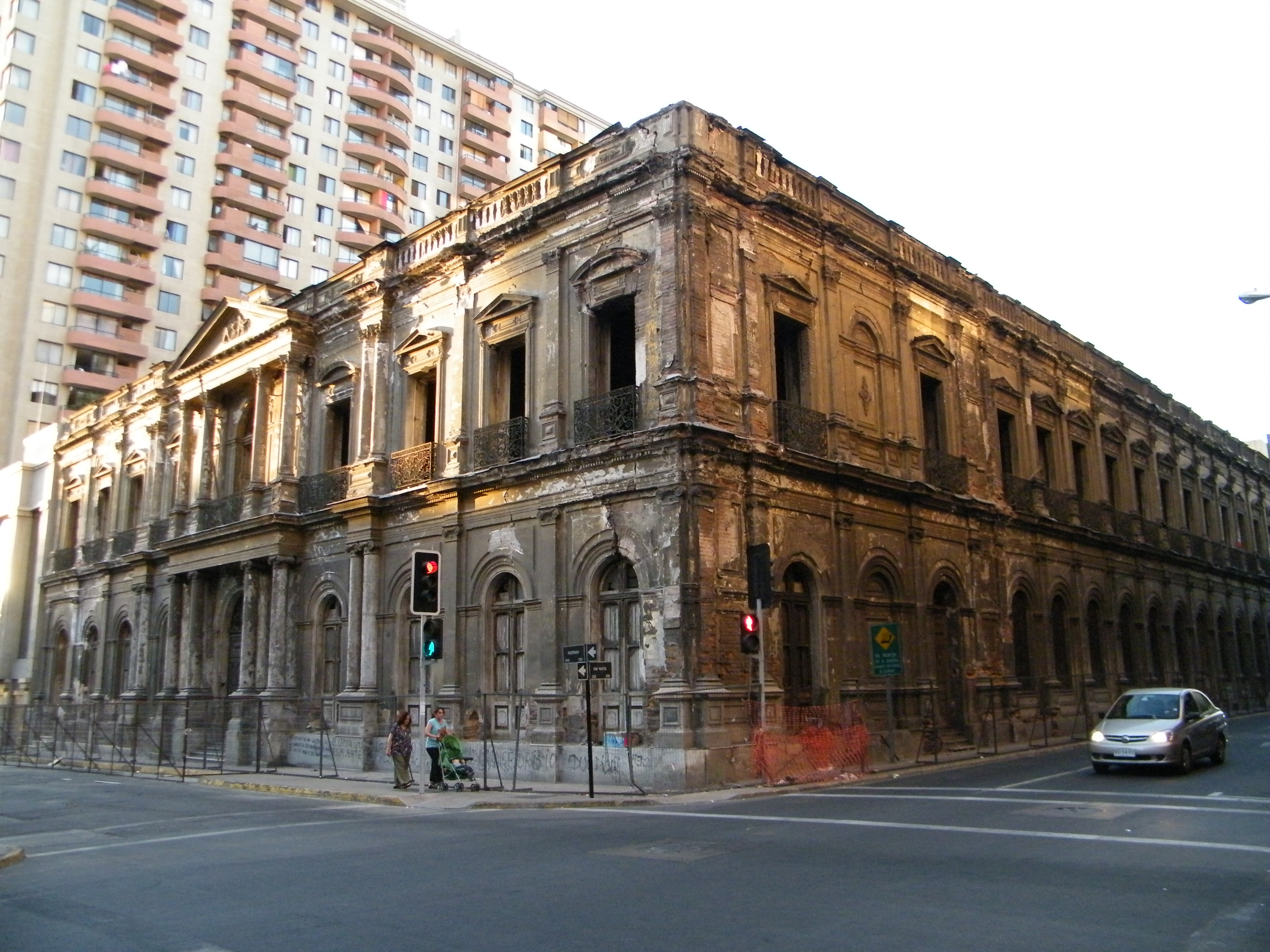 Palacio Pereira This is a photo of a national monument in Chile: 1241